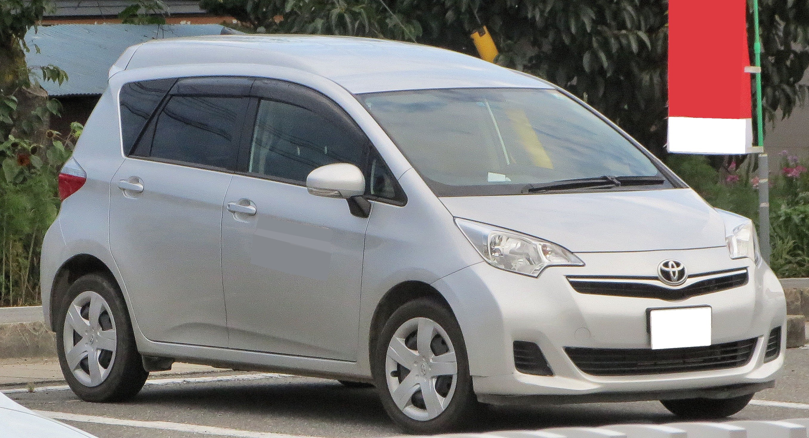 トヨタ ラクティス ウェルキャブ 車いす使用車 タイプII